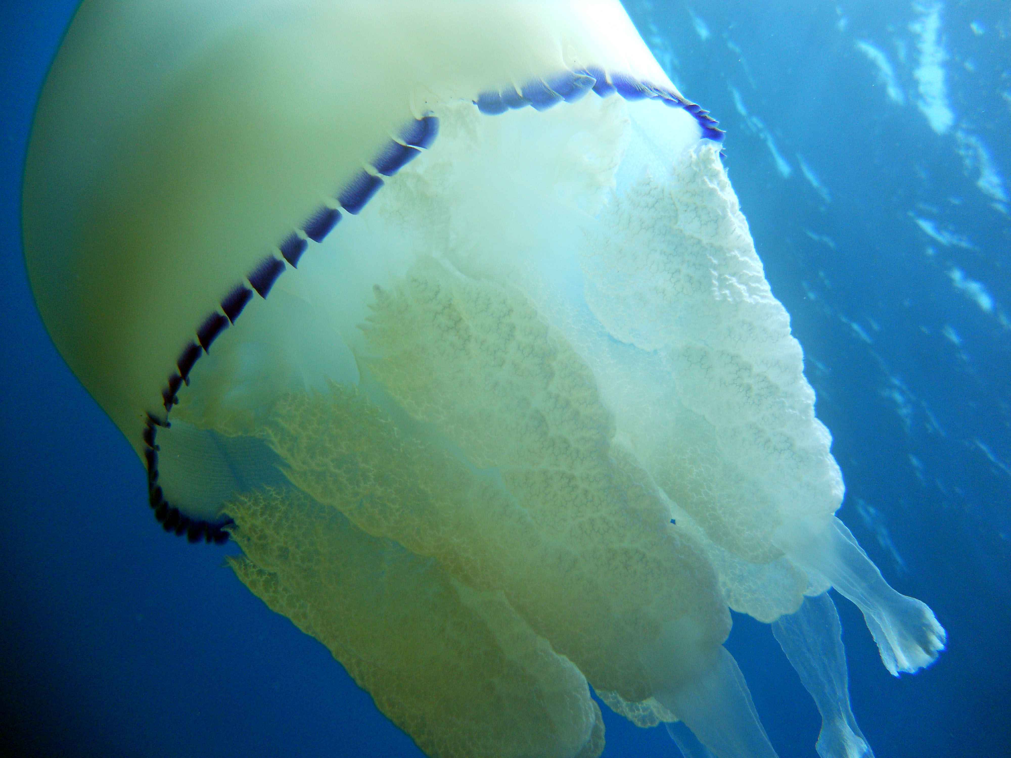 Rhizostoma pulmo Favignana, Sicily